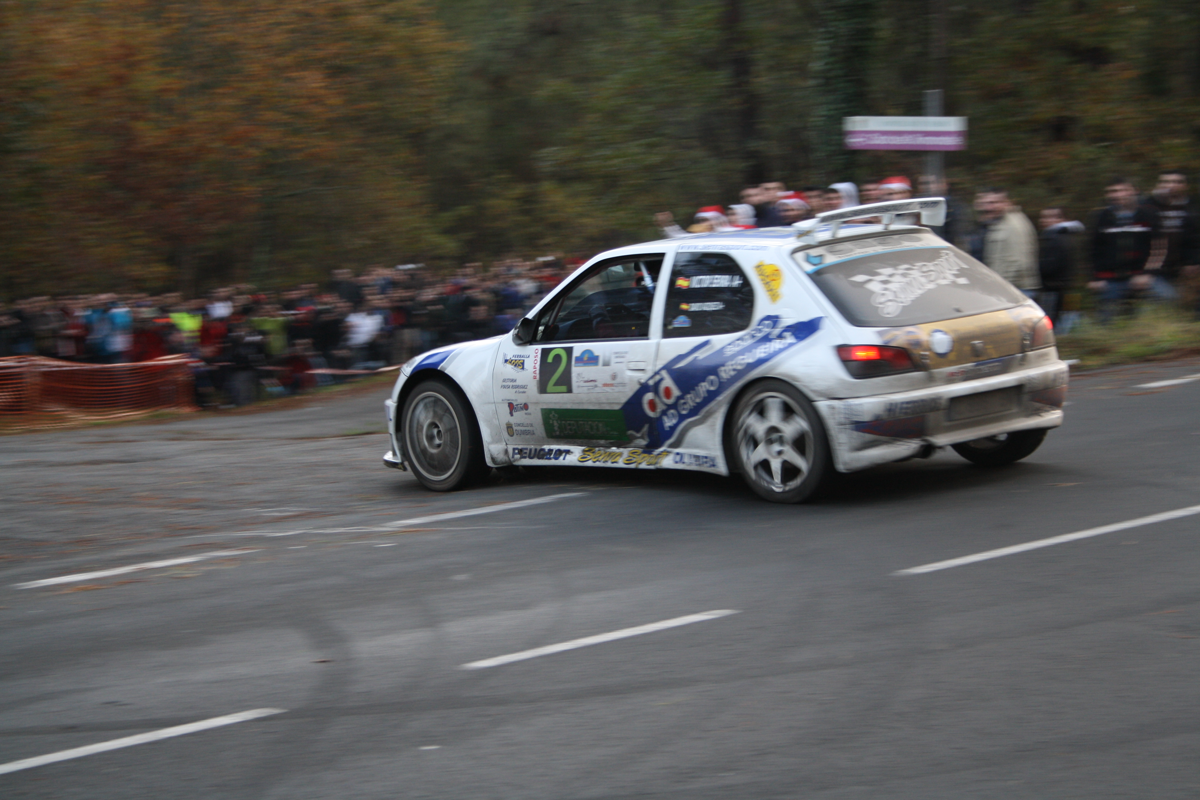 Victor Senra. Rally Botafumeiro 2011